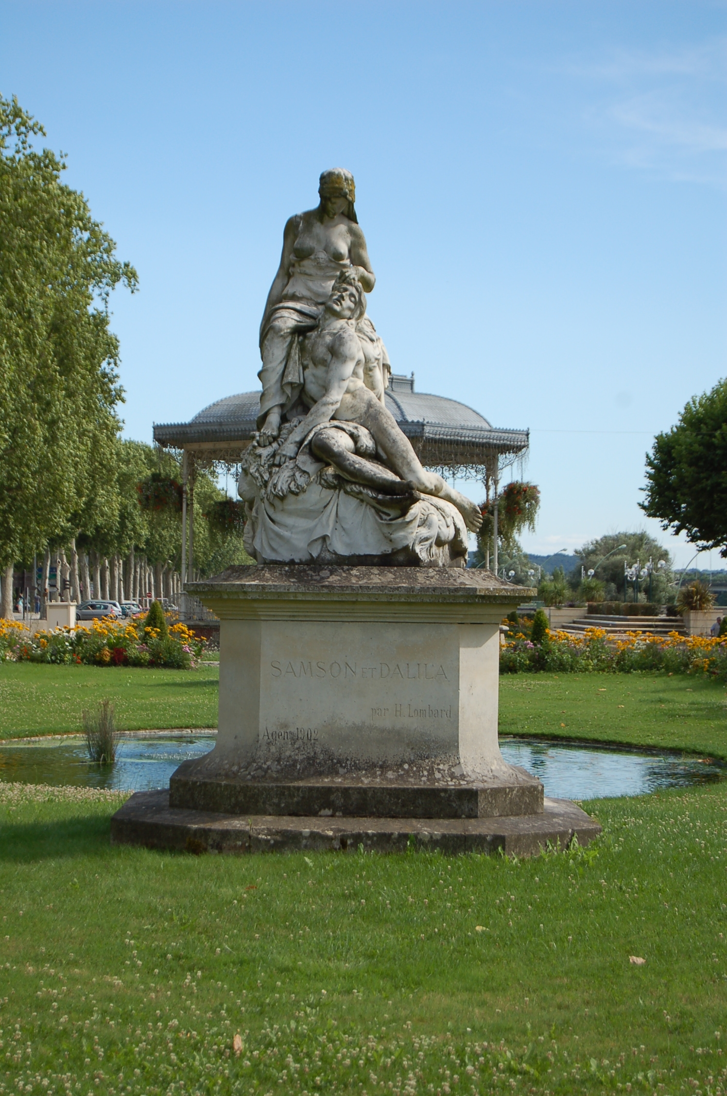 Statue de Samson et Dalila (1919) par Henri Lombard - Agen